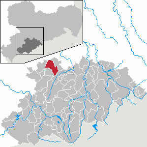 Jahnsdorf/Erzgeb. im Erzgebirgskreis, Sachsen